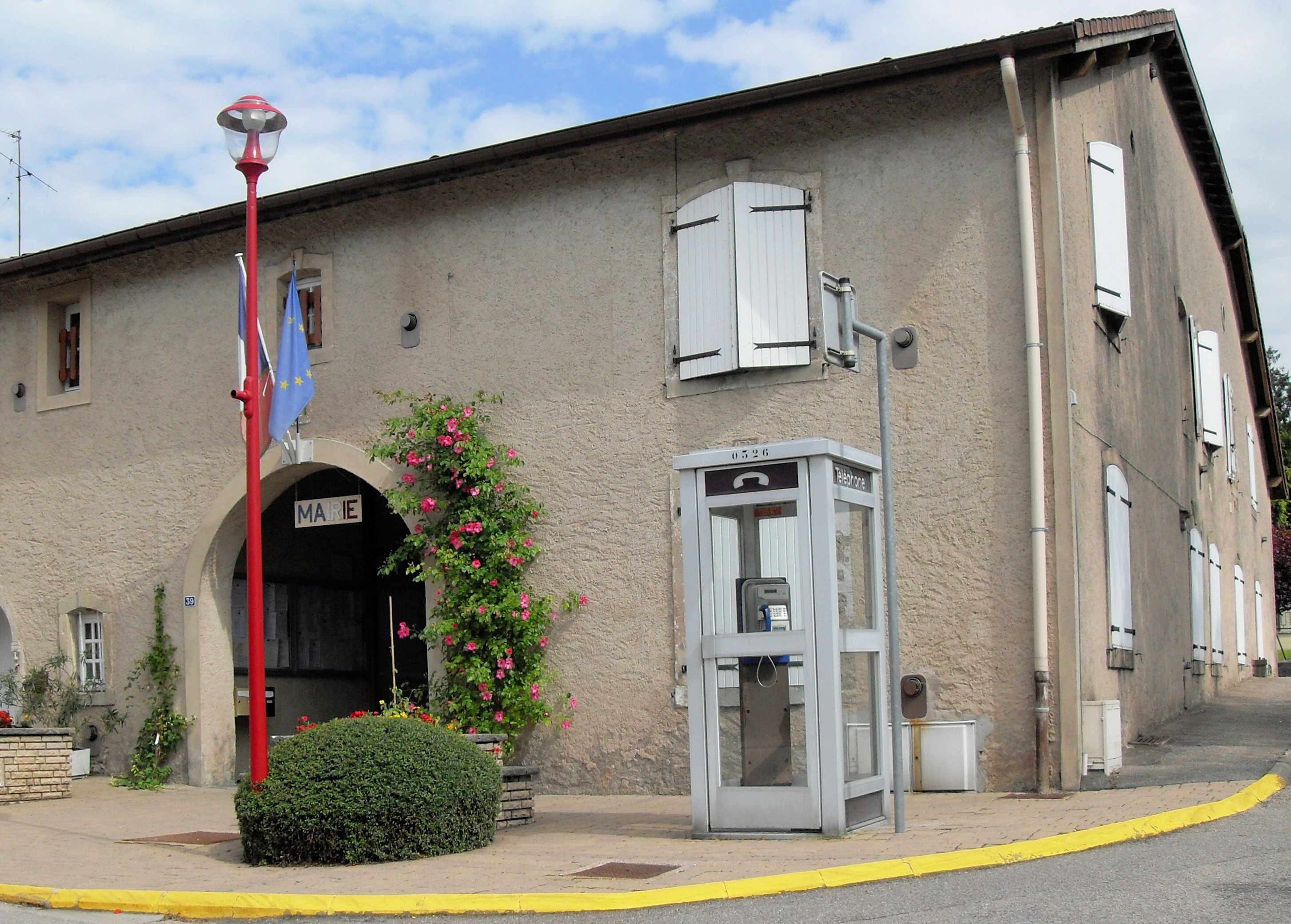 La mairie de Langley